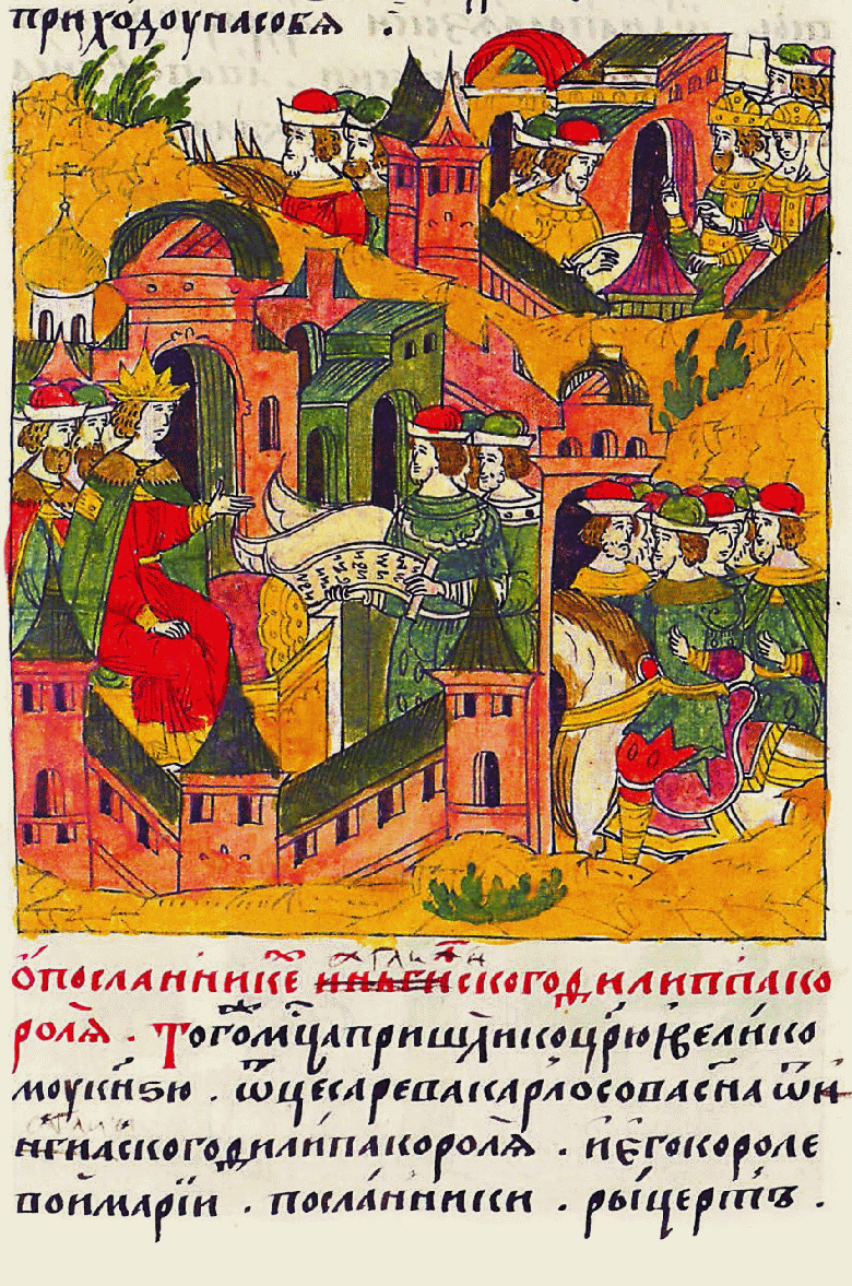 Лицевой летописный свод "О посланниках Английского короля Филиппа. В том же месяце пришли к царю и великому князю от сына цесаря Карла от Английского короля Филиппа и его королевы Марии посланники: Рыцерт [да Юрий с грамотами; а в грамотах писал к царю и великому князю с великой любовной похвалой, и царем его благочестивым называл на многих государствах, и с челобитьем и прошением о всяком добре. А привезли три грамоты: одна на итальянском языке, а другая на польском, а третья на греческом; а во всех писано одно и то же. И государь их пожаловал великим жалованием"]